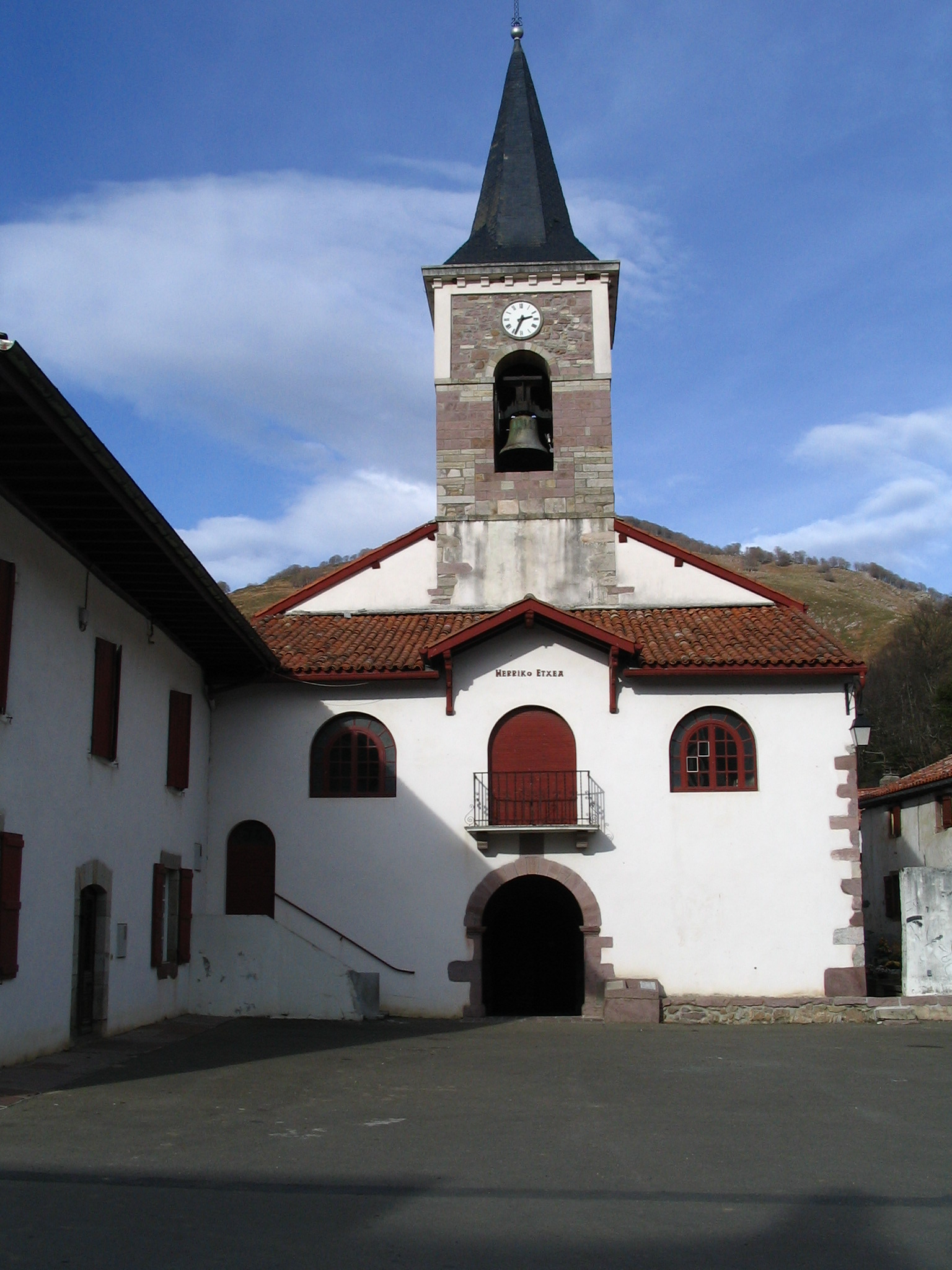 Eglise d'Aldudes - Pays Basque - Pyrénées Atlantiques - France Auteur/author: P.Charpiat 2006